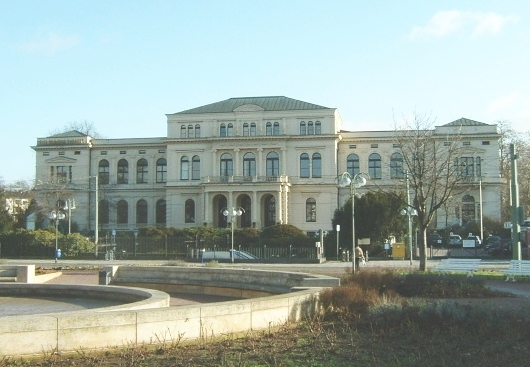 Zoo Frankfurt